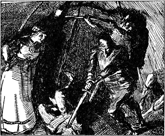 Christian Krogh: Illustration for Harald Hårfagres saga, Heimskringla 1899-edition. nn: «Gunnhild let drepe finnane.» nb: «Gunnhild lar finnene drepe.»